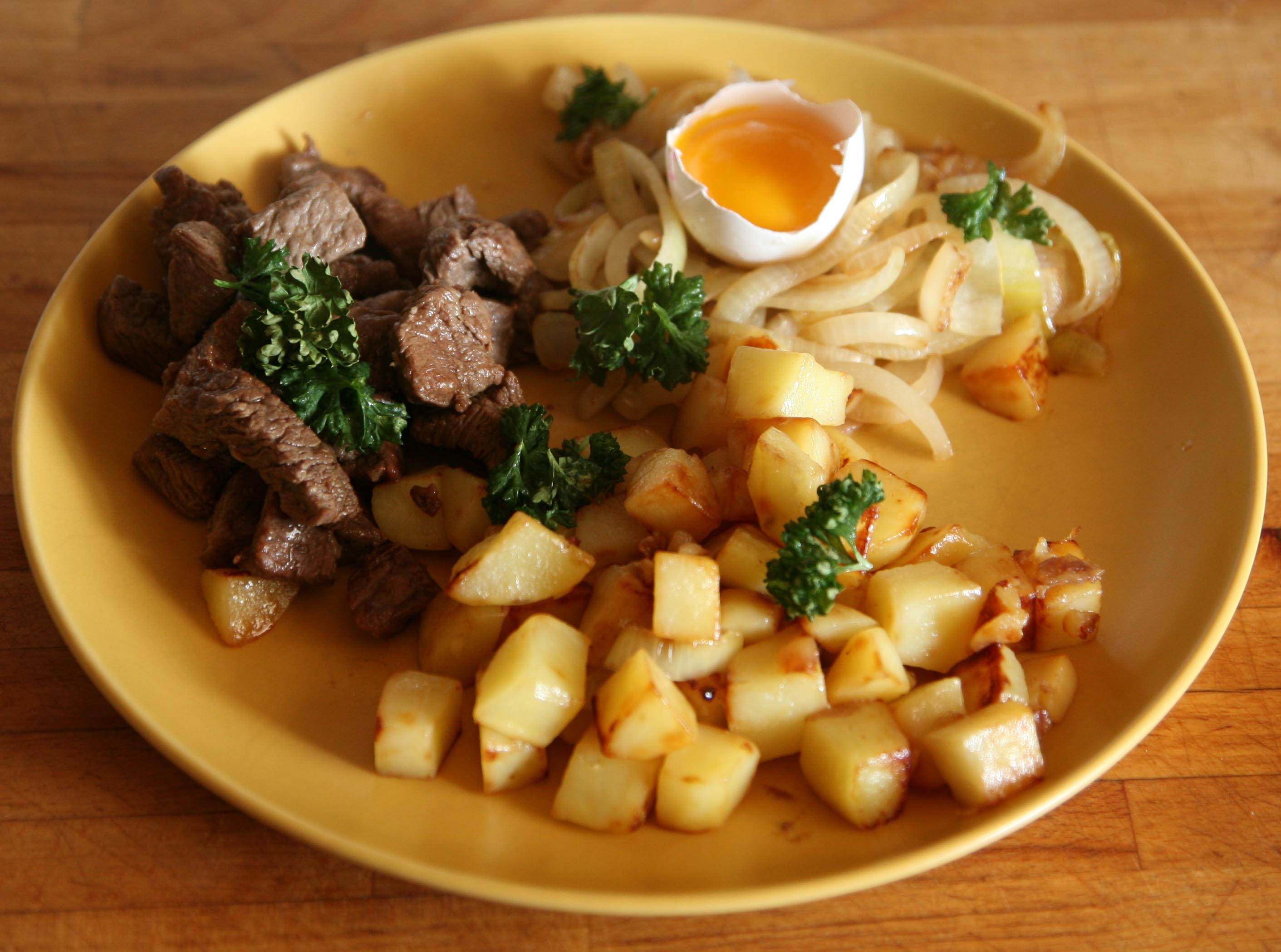 Bild på maträtten Biff Rydberg